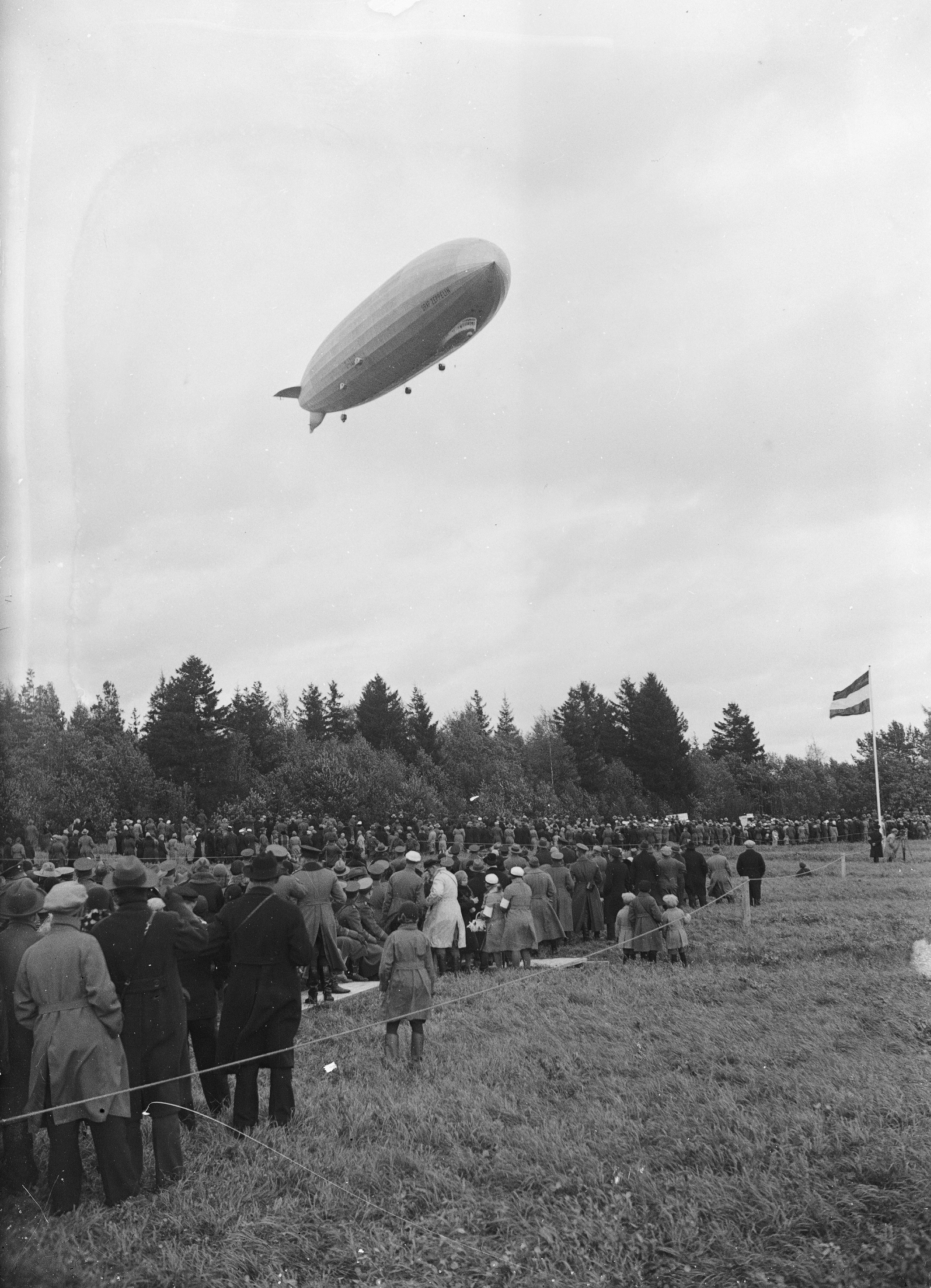 Ilmalaiva Graf Zeppelin Viikin niityn yllä; pysty, mustavalkoinen, lasi